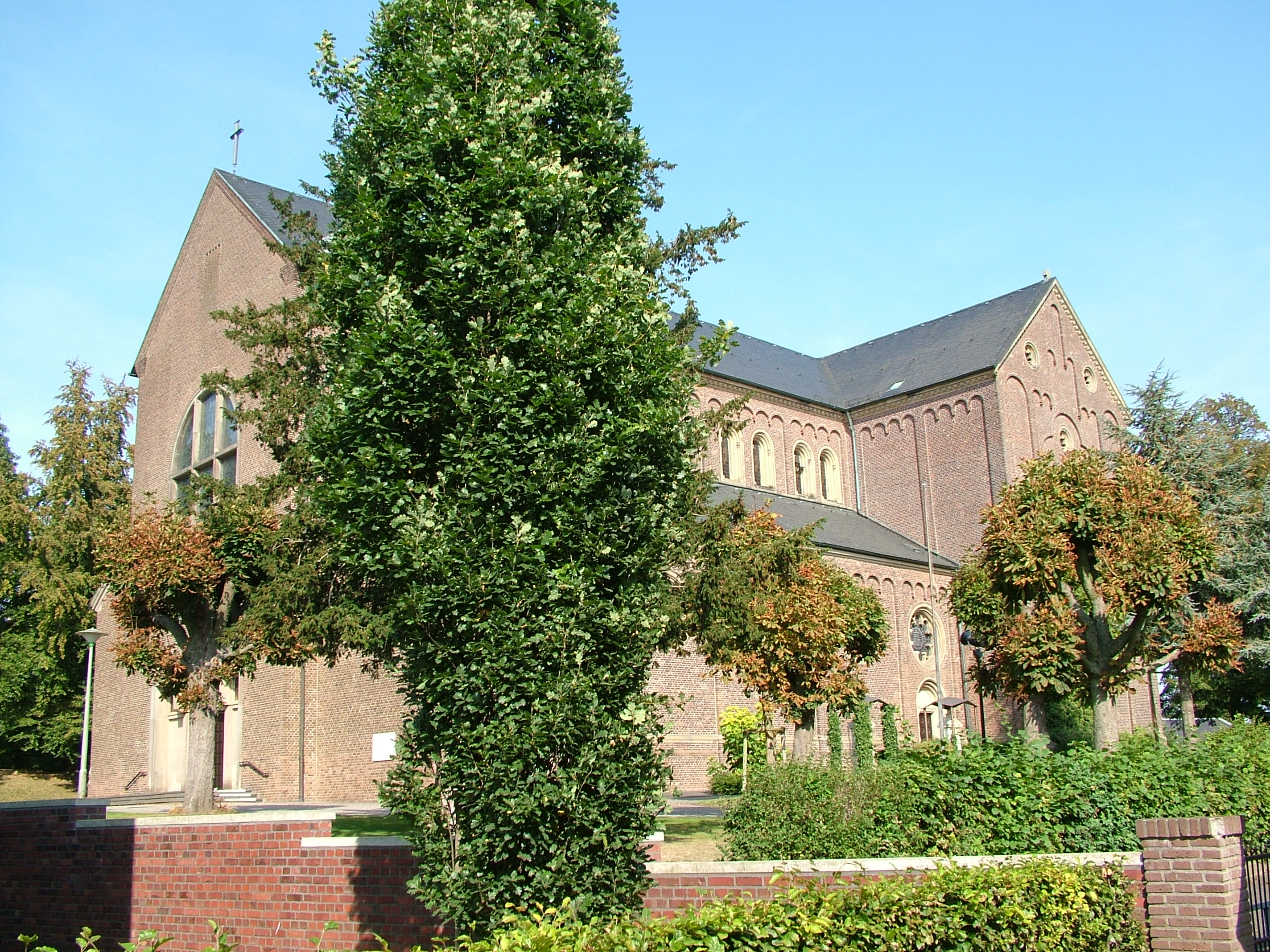 Anholt (Isselburg), St. Pankraz